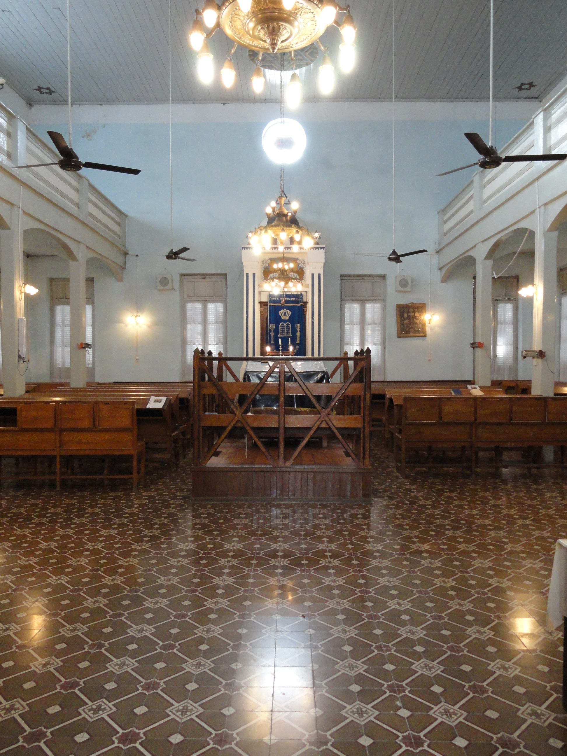 Synagogue Baron Hirsch in Moisés Ville (Argentina) - Inside